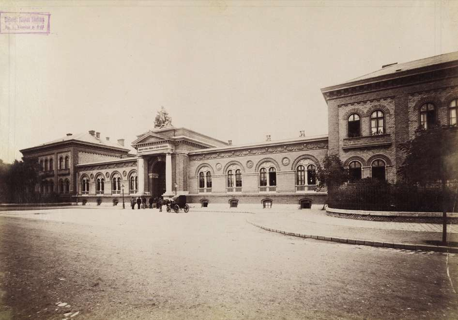 Budapest, IX. Nagyvárad tér, Szent István kórház. Fortepan / Budapest Főváros Levéltára. Levéltári jelzet: HU.BFL.XV.19.d.1.07.141